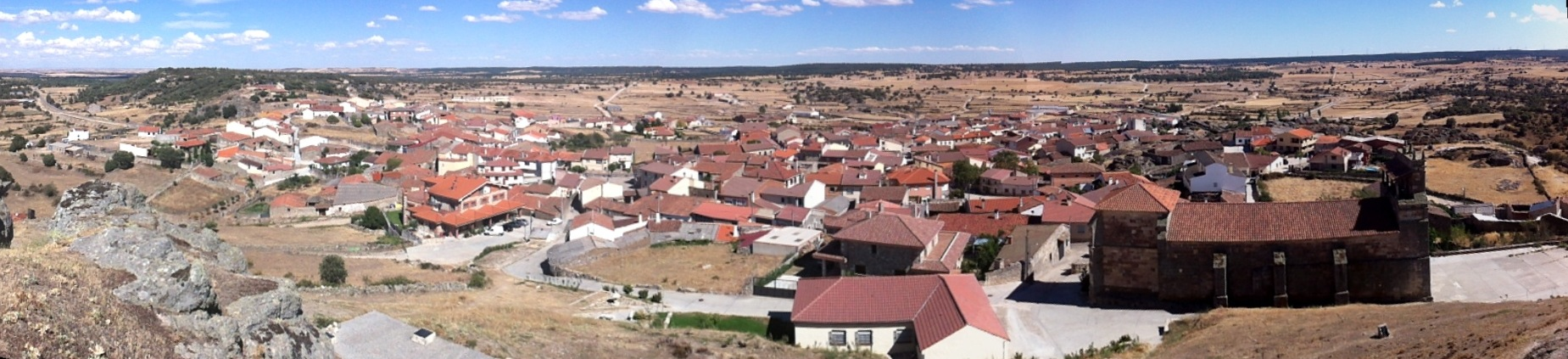 Panorámica de Peñausende desde el castillo.